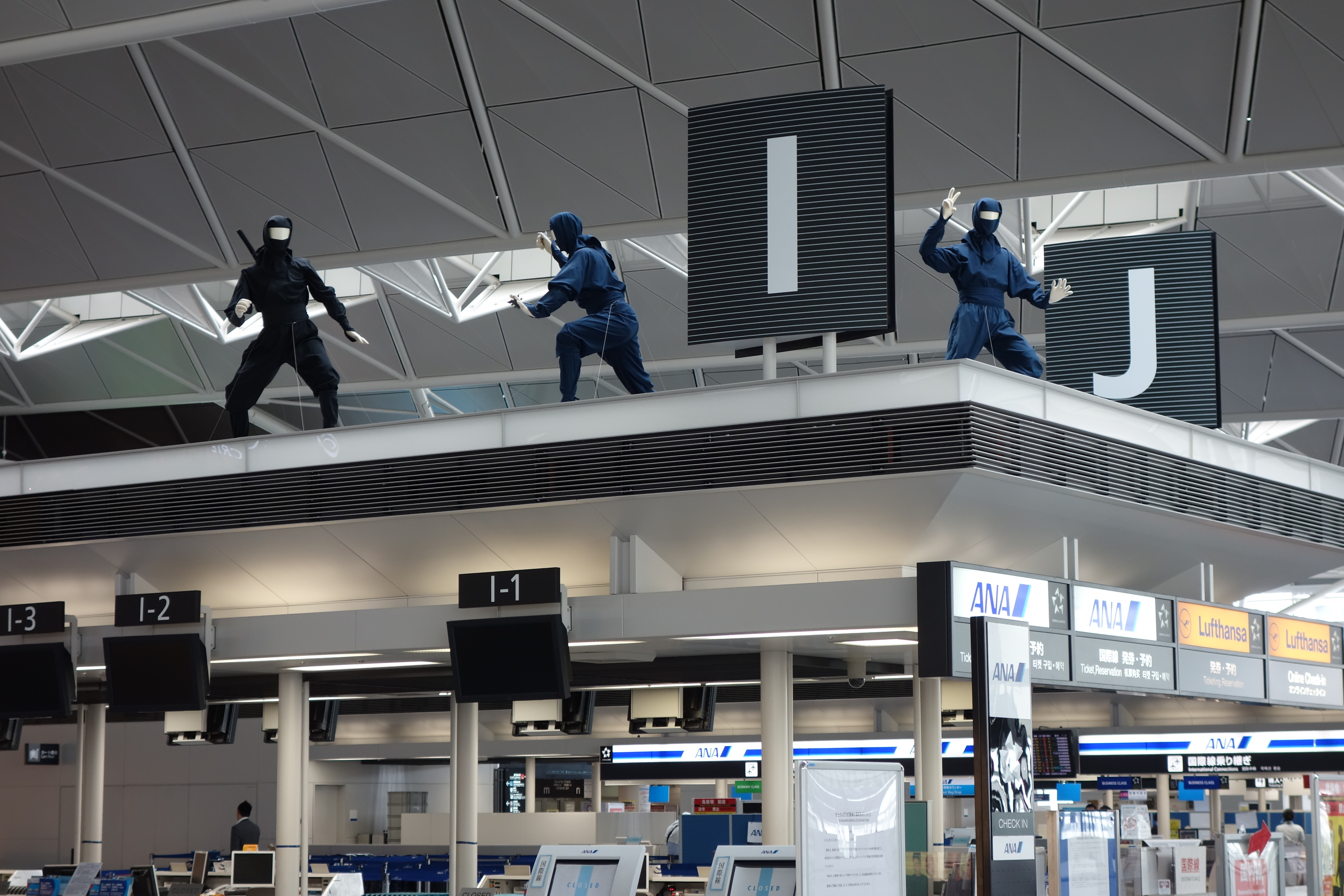 セントレア 出発ロビー上に「参上」した忍者 （三重県観光キャンペーン推進協議会、2013年5月23日～10月30日）